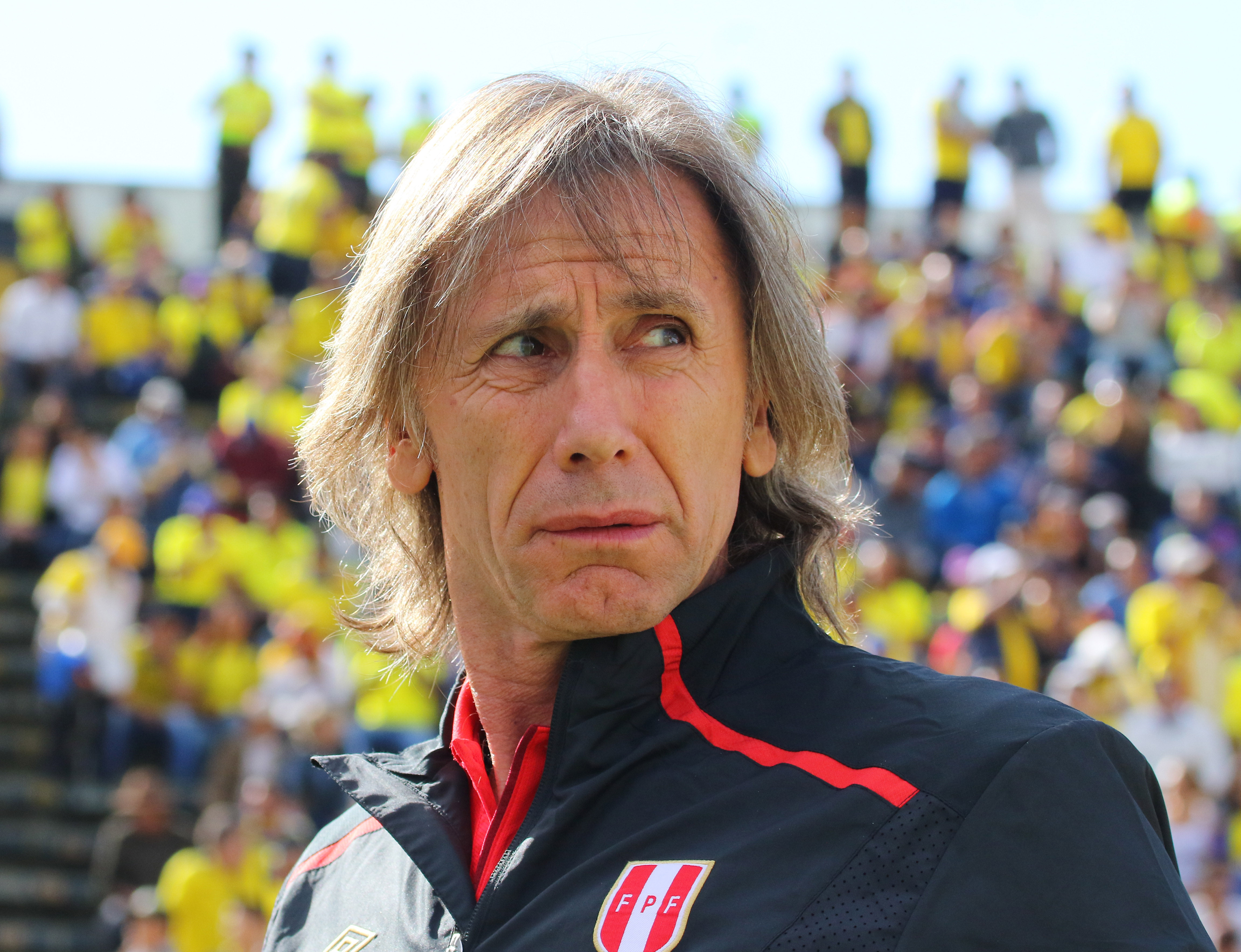 Quito 5 Sep (Andes).- Encuentro por eliminatorias Rusia 2018 entre Ecuador y Perú. Fotografías: Carlos Rodríguez/Andes.